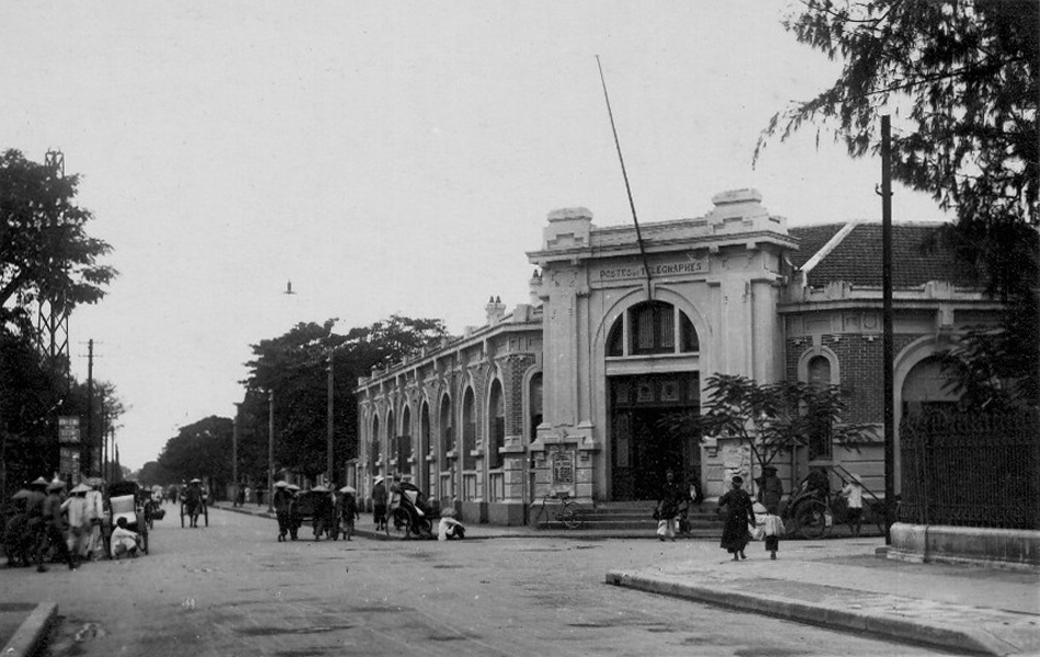 Ảnh chụp Bưu điện Nam Định ở thành phố Nam Định thời Pháp thuộc, tức giai đoạn cuối thời Nguyễn.